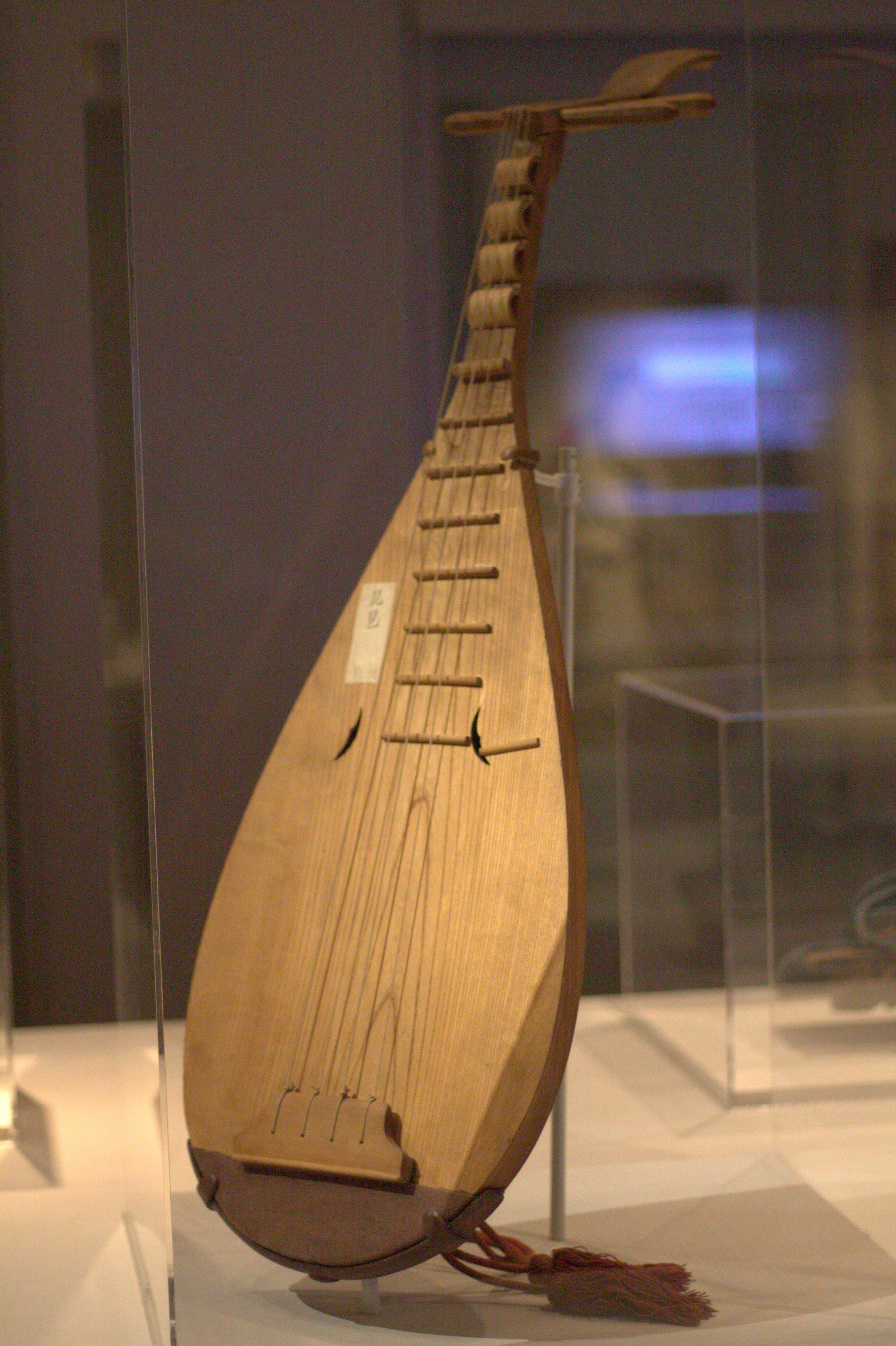 국립중앙박물관 '120년 만의 귀환, 미국으로 간 조선 악기' 특별 전시에 나온 비파